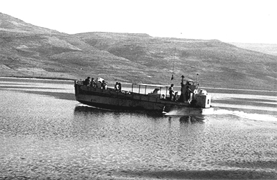 נחתת מכוניות שהוסבה לספינת משמר ומסיירת בכנרת על רקע רמת הגולן